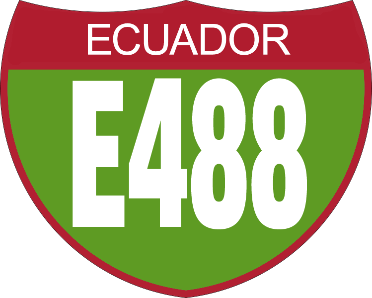 Disco de Identificación Ruta E488